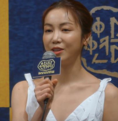 28일 오후 서울시 강남구 논현동 임피리얼팰리스호텔에서 tvN 새 토일드라마 ‘아스달 연대기’ 제작발표회가 열려 배우 송중기X장동건X김지원X김옥빈이 참석해 배역소개 인사와 작가의 기획의도를 설명하고 있다.